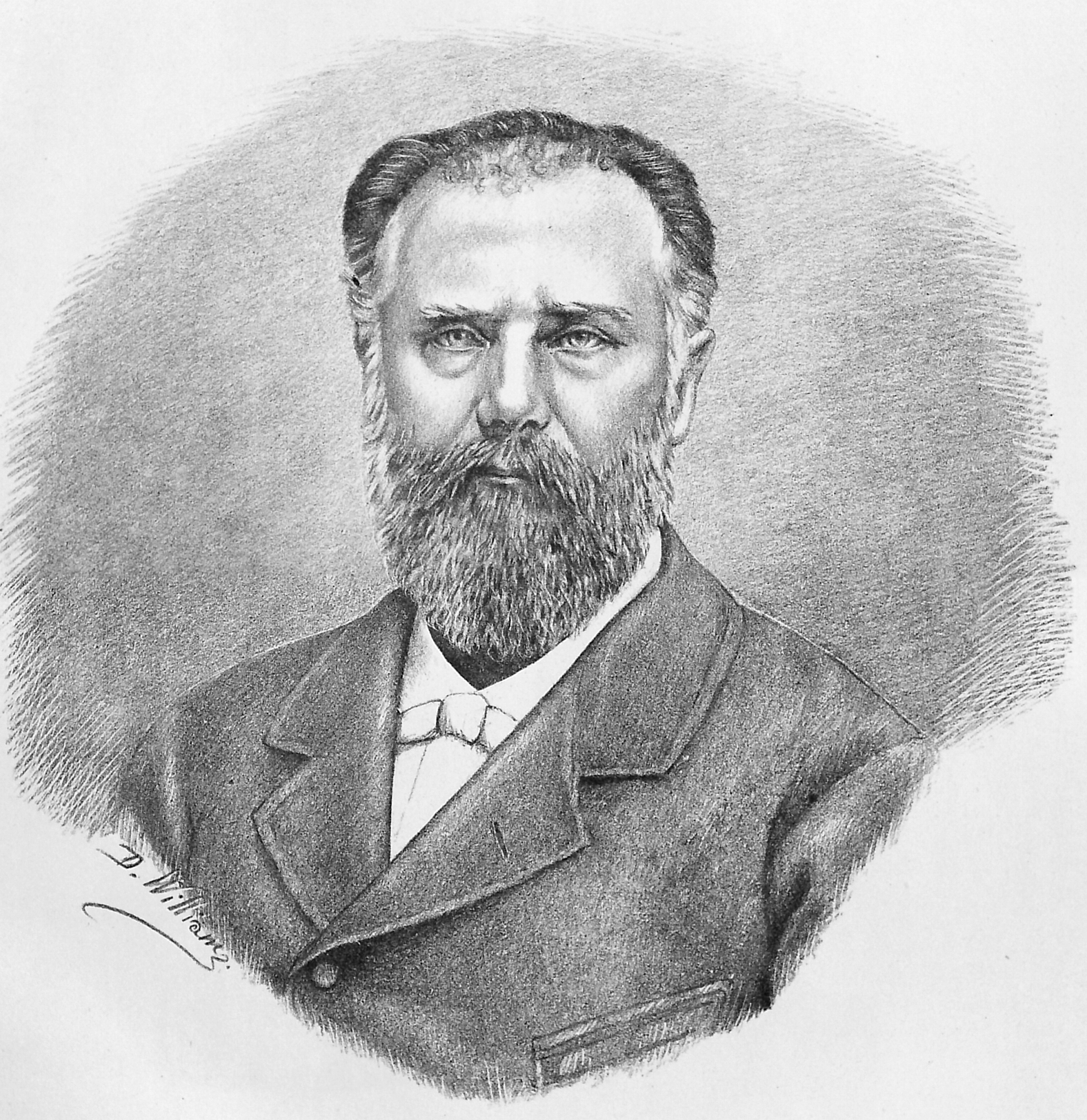 Portraits contemporains avec autographes : Politique, armée, clergé, letters, théatres & arts dessines & lithographies par D. William Bukarest, 1881 G. Vernesco - Ancien Ministre et Député